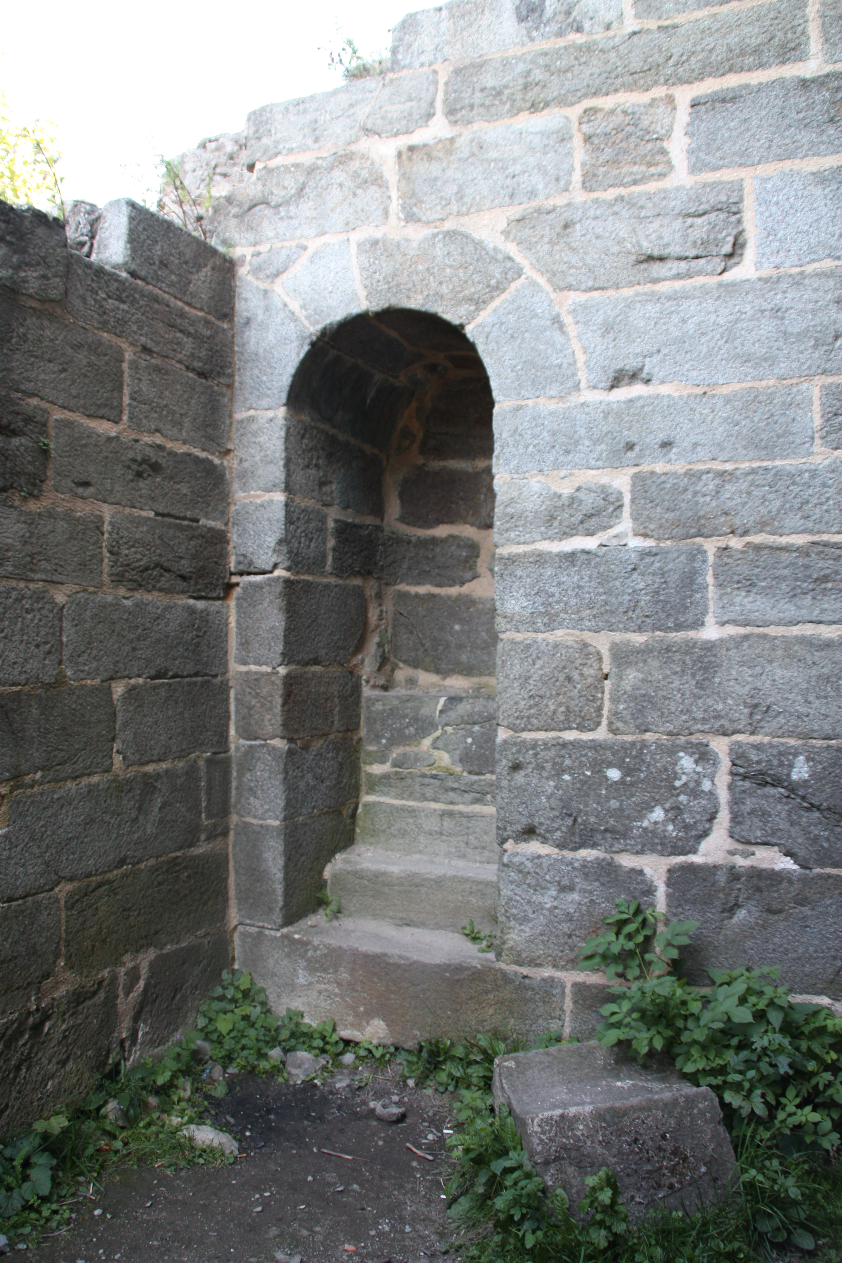 Burg Přimda, Westböhmen, Tschechische Republik. Abortanlage in der Nordwand des Risalits, Erdgeschoss (von SO).